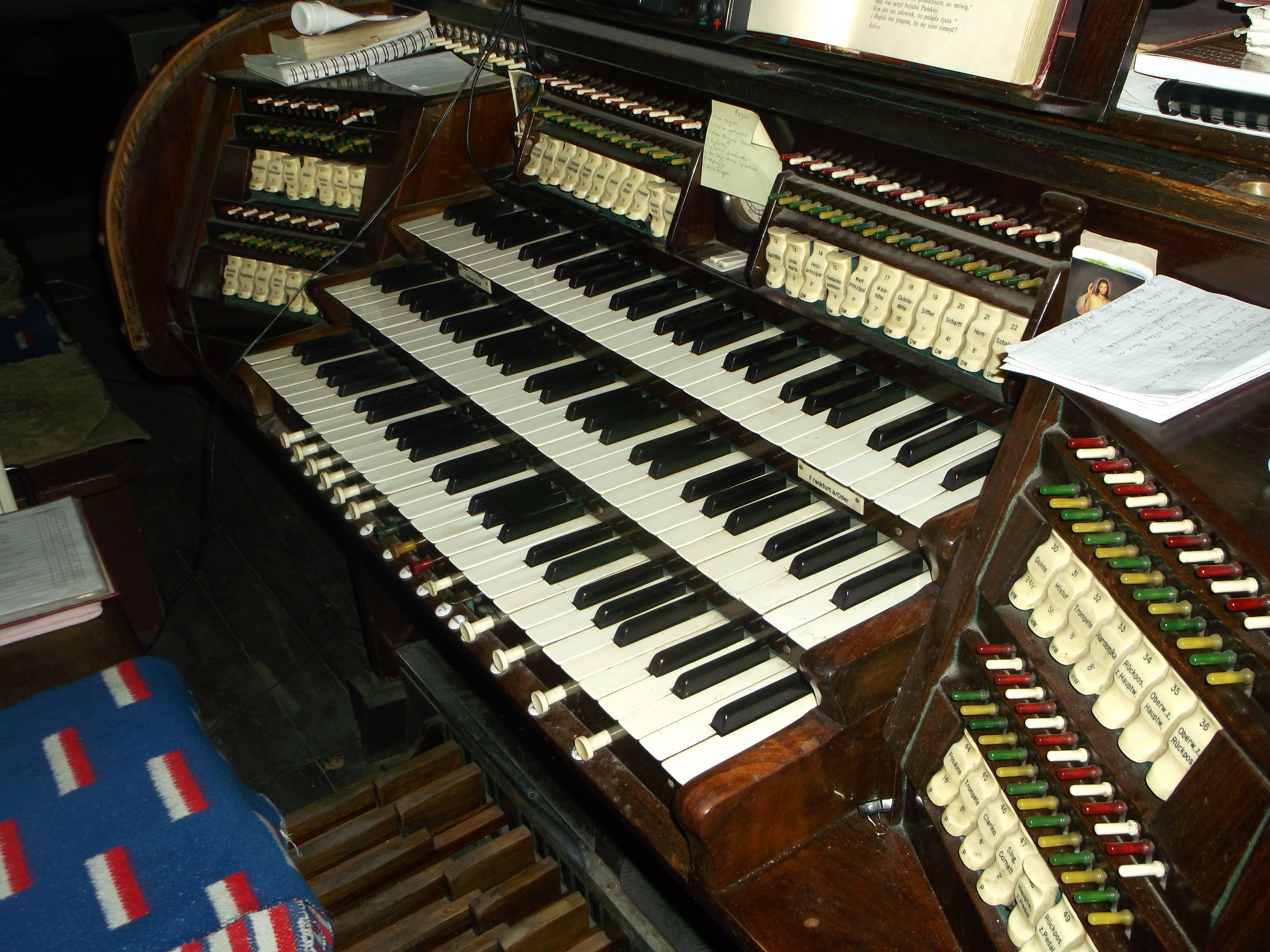 kontuar organów zbudowanych w 1934 przez firmę Sauer z Frankfurtu nad Odrą do kościoła św. Katarzyny w Bierutowie